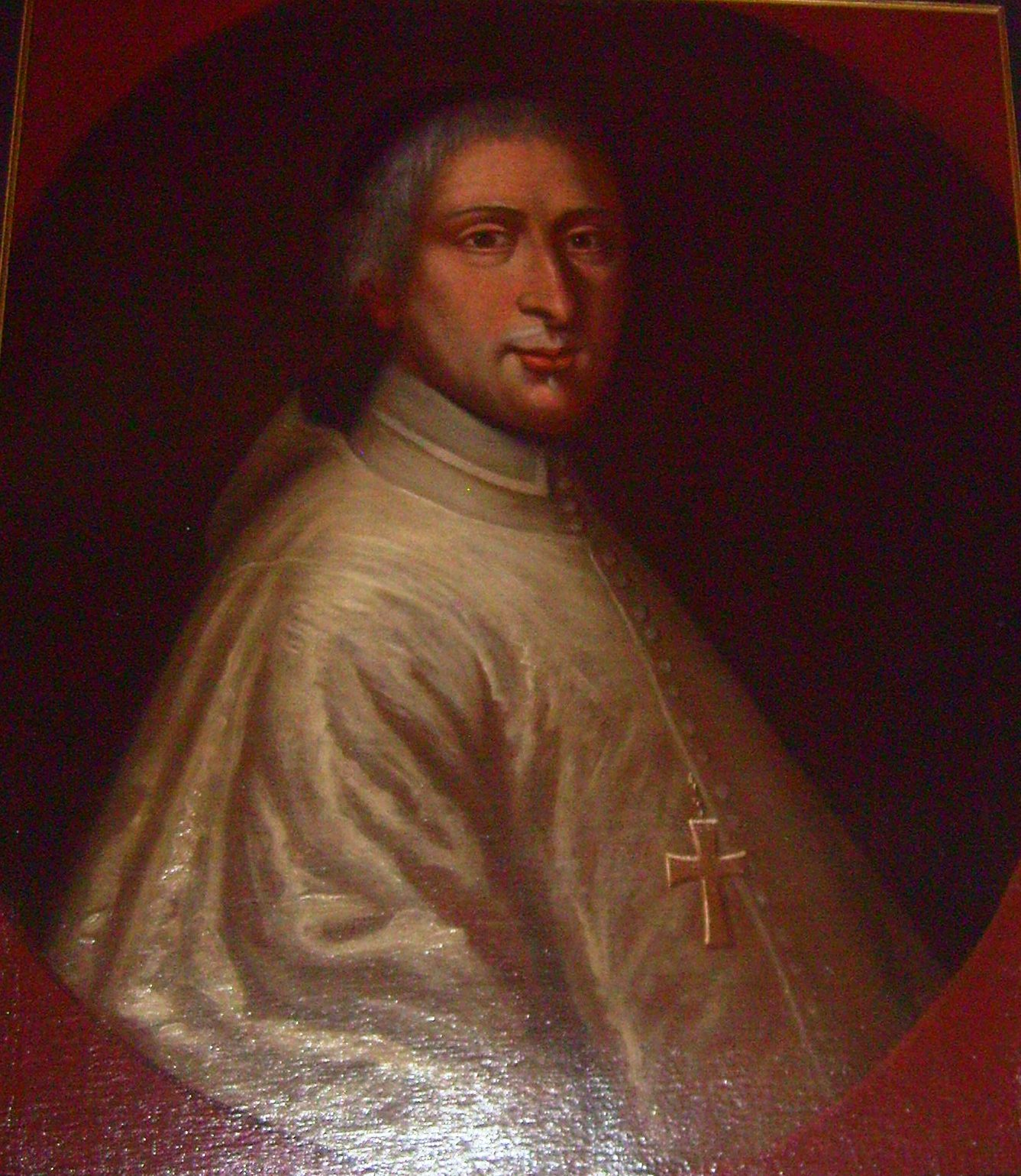 Abt Michael Reinartz, Kloster Wedinghausen